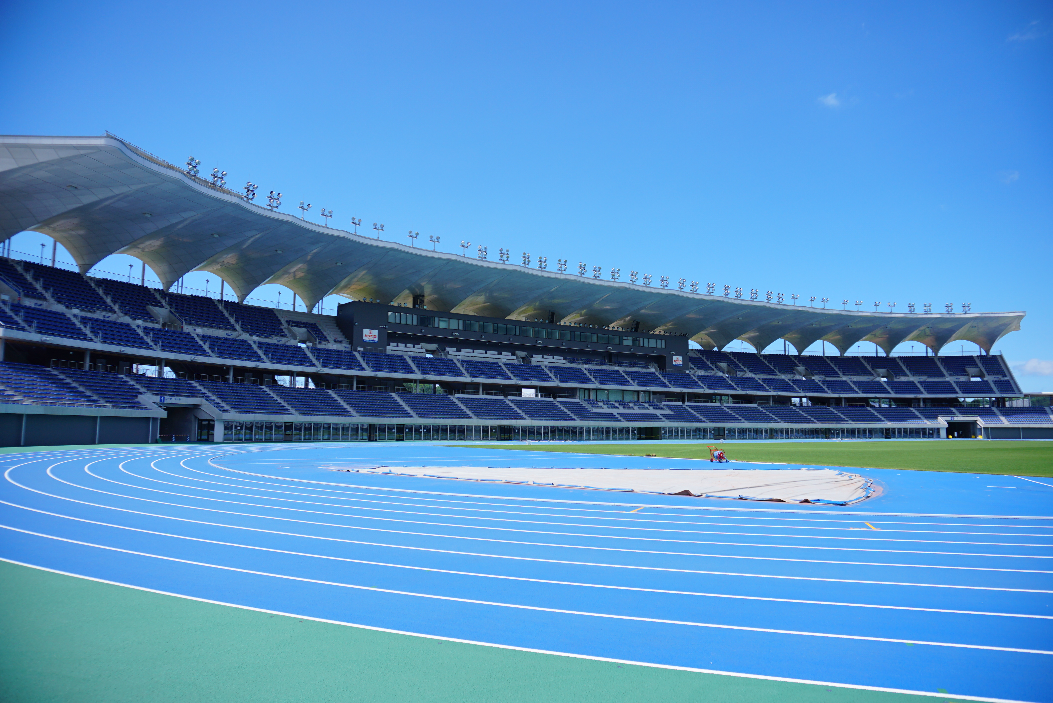 新青森県総合運動公園陸上競技場（青森県青森市）。伊藤豊雄の設計によるスタジアムで、フィールド、観客席とも青を基調として統一されている。